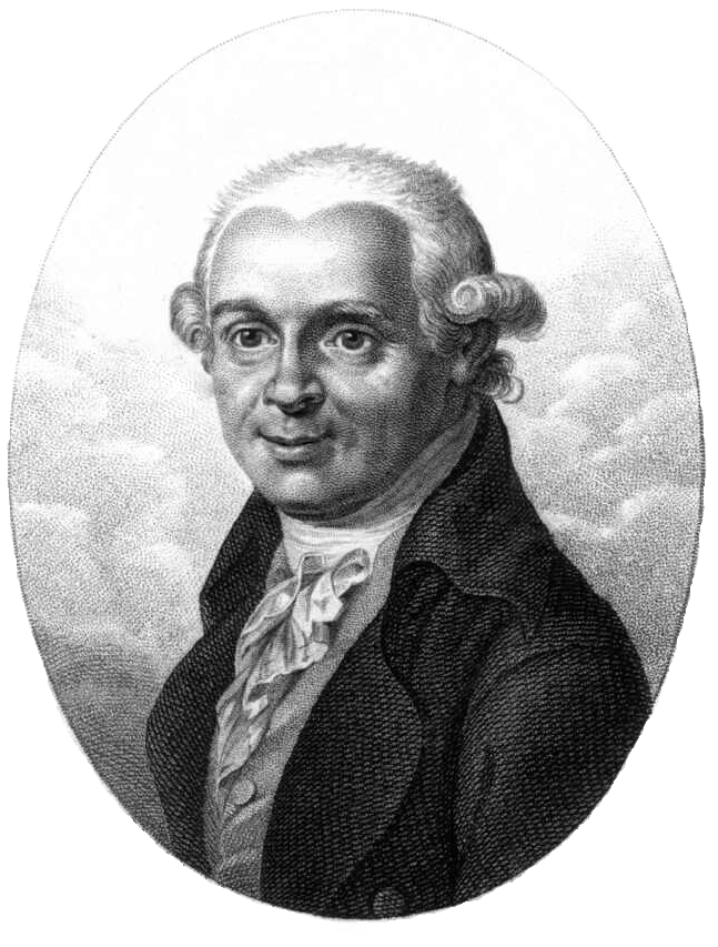 Der Mineraloge Abraham Gottlob Werner (1749–1817) nach einem Poträt von Christian Leberecht Vogel.